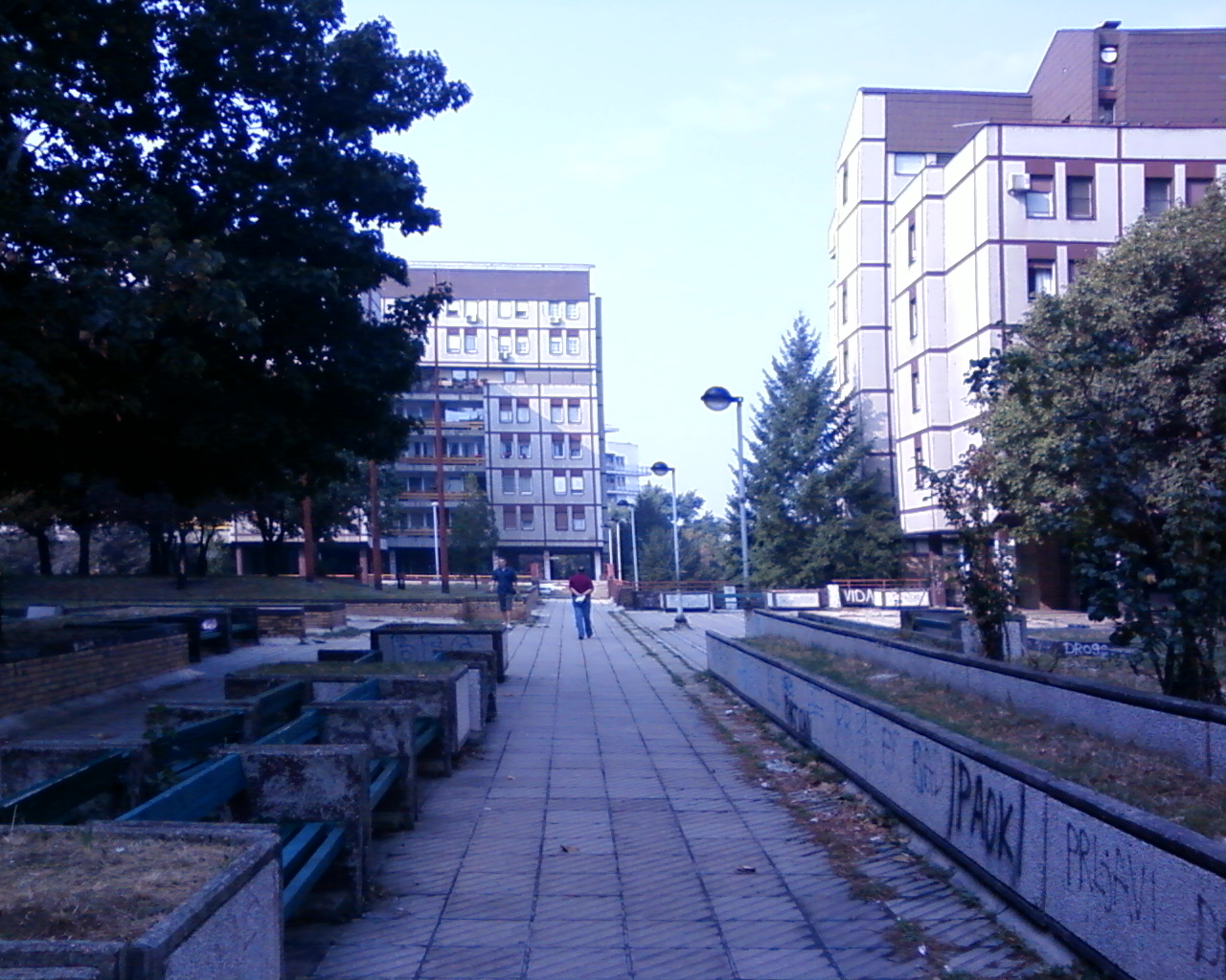 Blok 19a, Beograd, Serbia